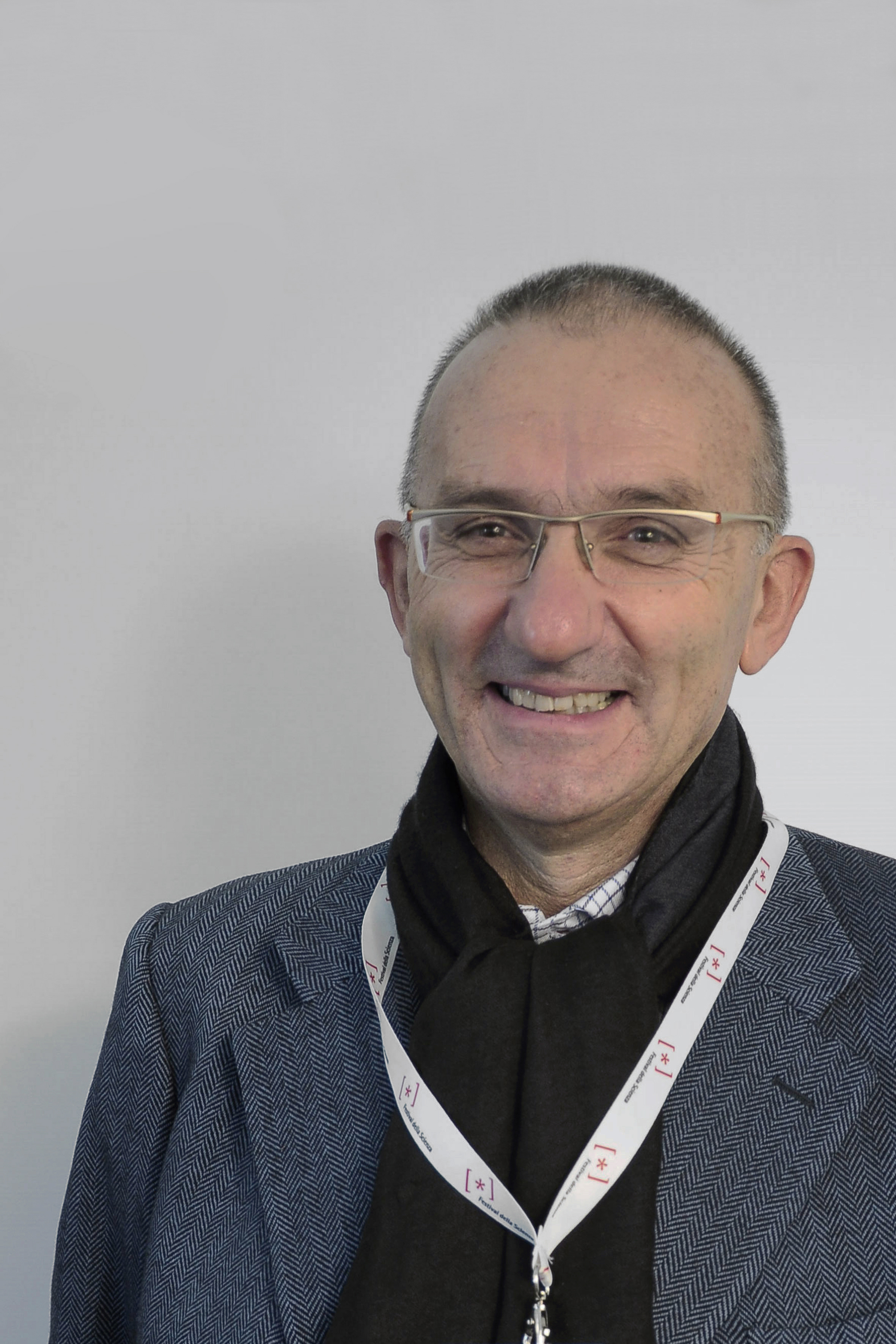 Foto: Cirone-Musi